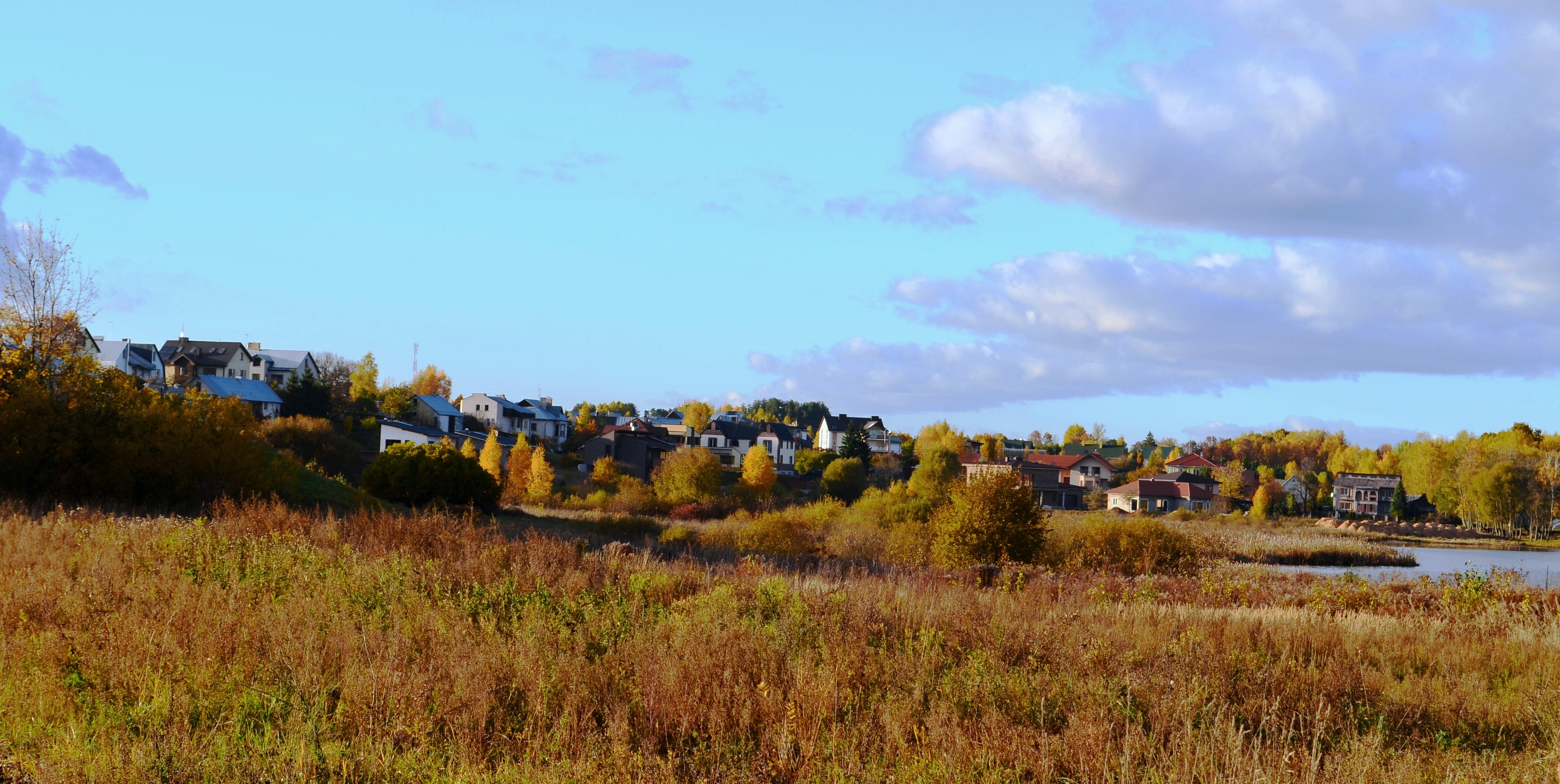 Antežeriai, Vilniaus raj.